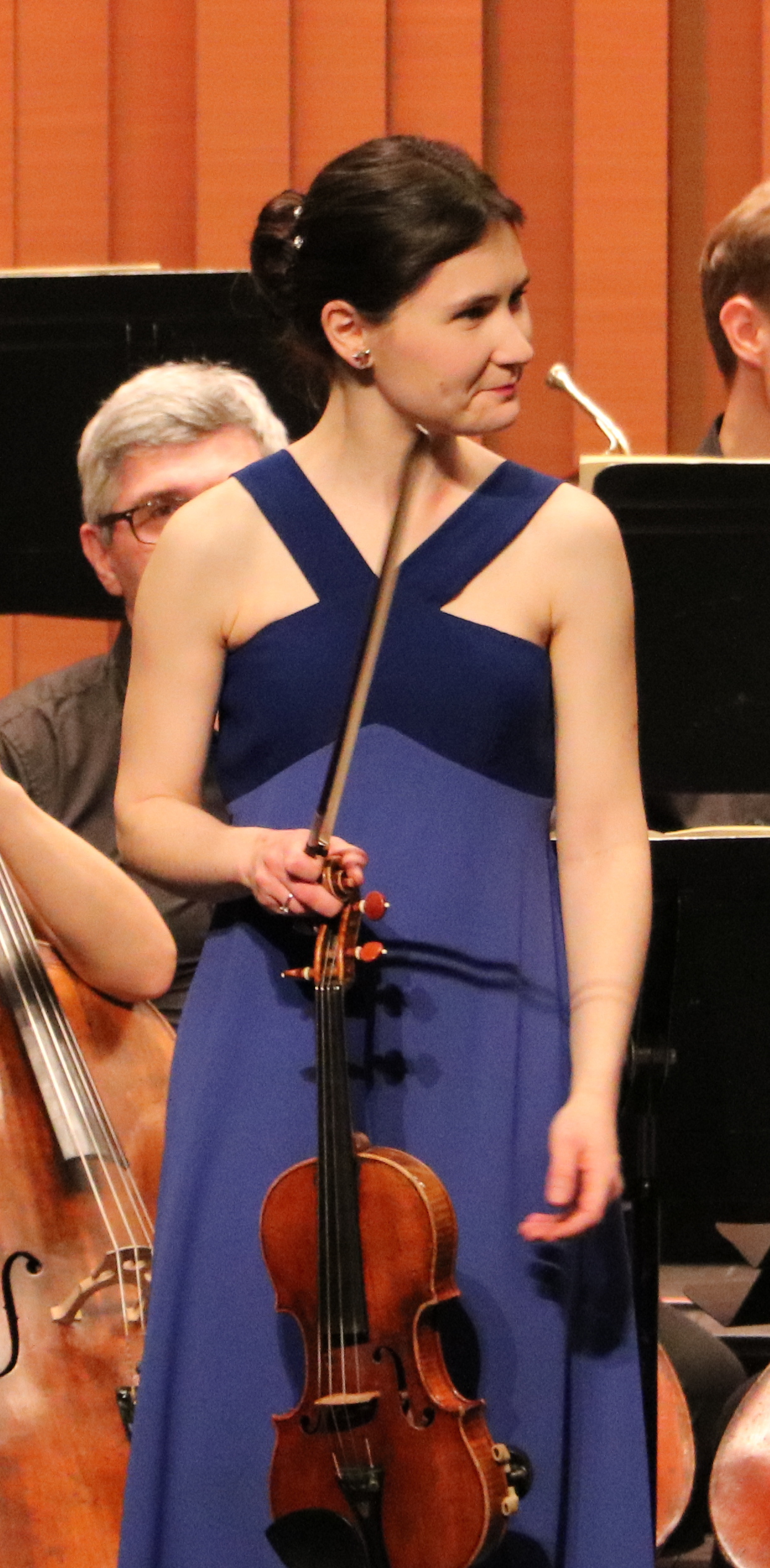 Fanny Clamagirand lors d'un concert à la Folle Journée de Nantes le 30 janvier 2019